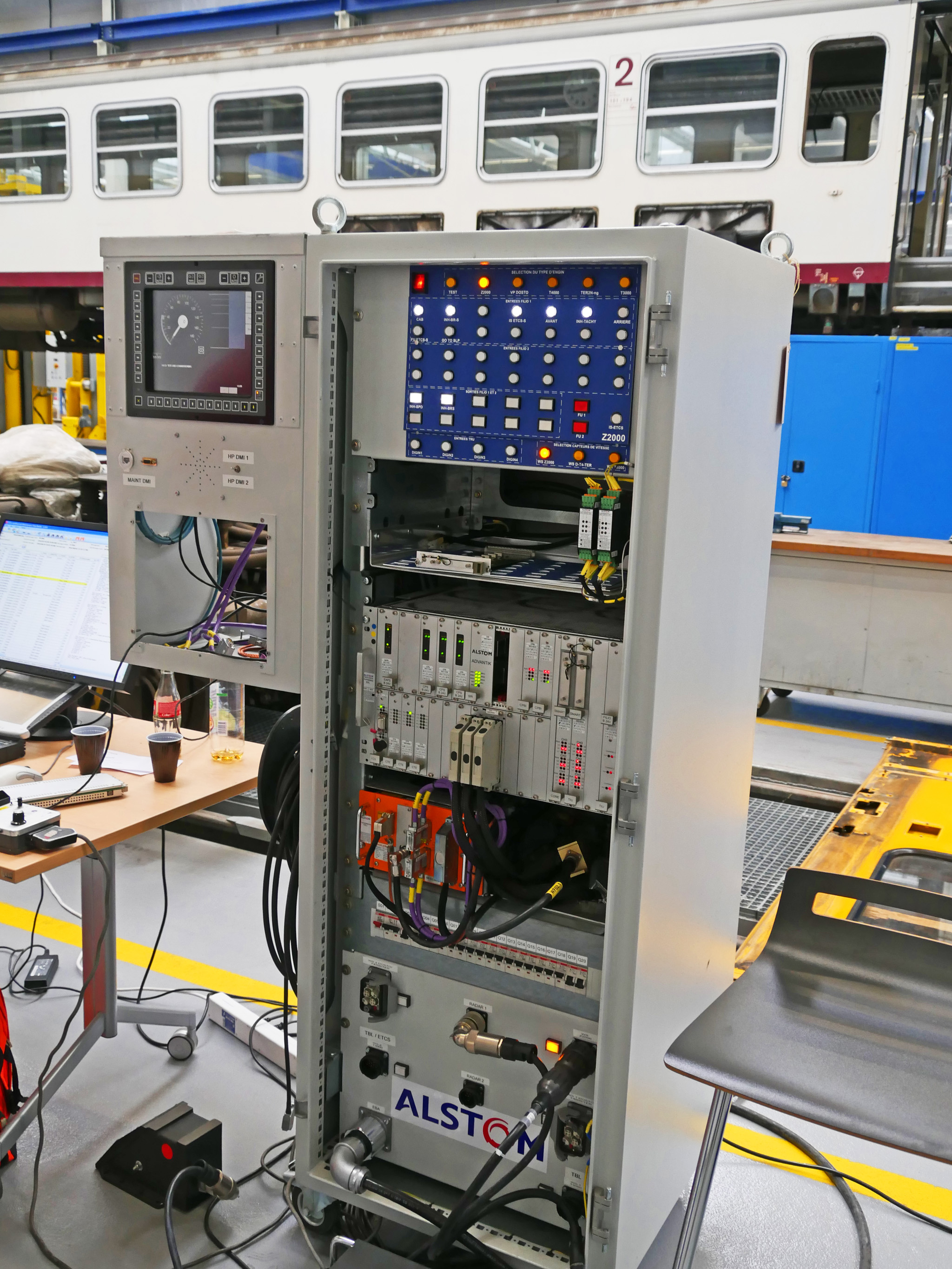 Dispositif ETCS tel qu'embarqué dans une automotrice CFL 2000 (Z2).